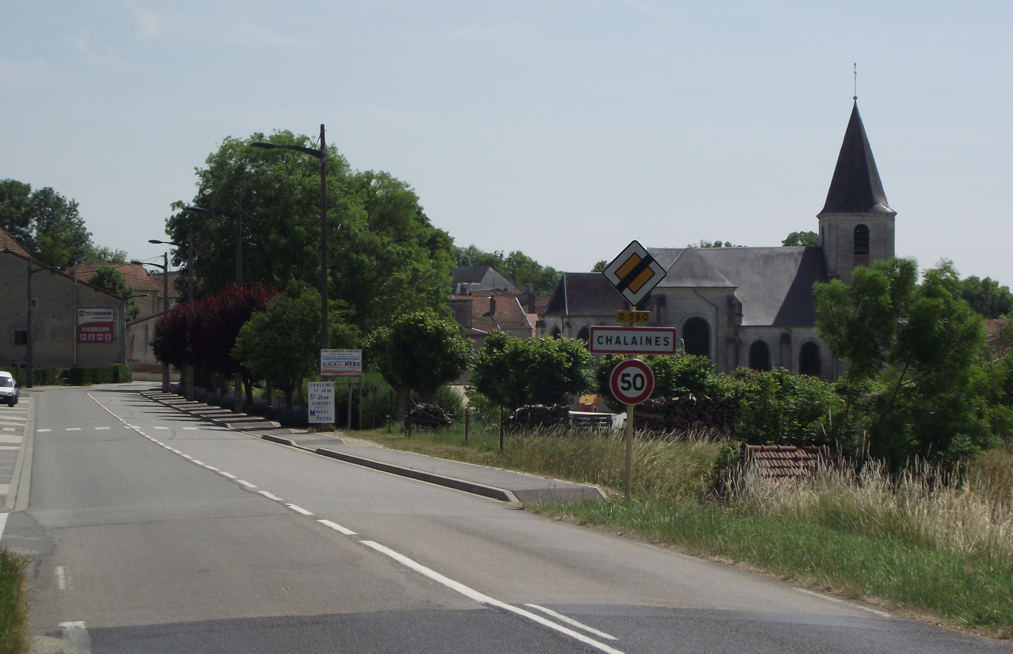 Entrée de la commune de Chalaines (55)